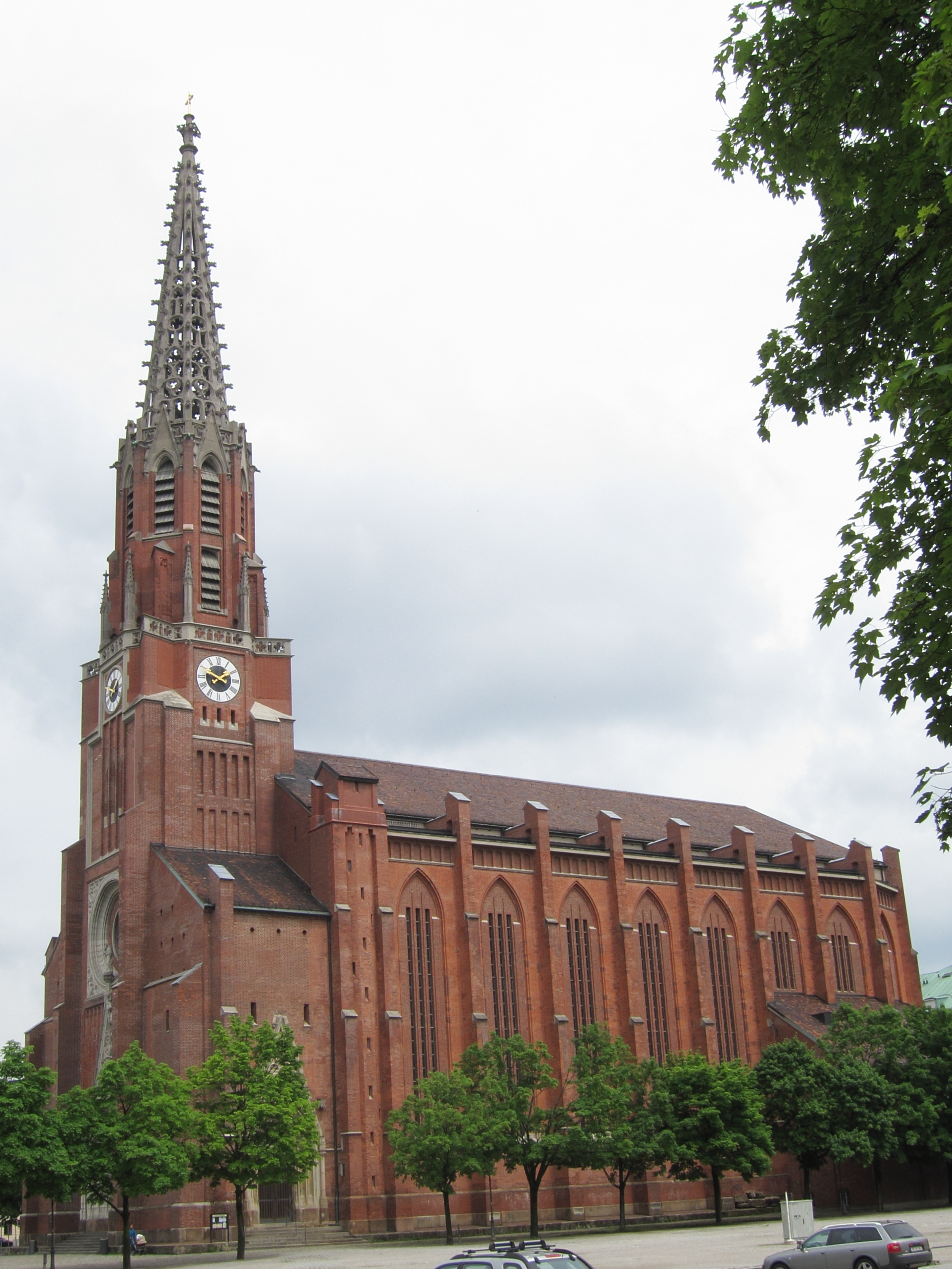 Mariahilfplatz 42; Kath. Pfarrkirche Mariahilf in der Au, frühes Werk der Neugotik, mit hohem Turm, 1831–39 von Joseph Daniel Ohlmüller; Inneres nach Kriegsschäden neugestaltet; freistehend in Platzmitte.